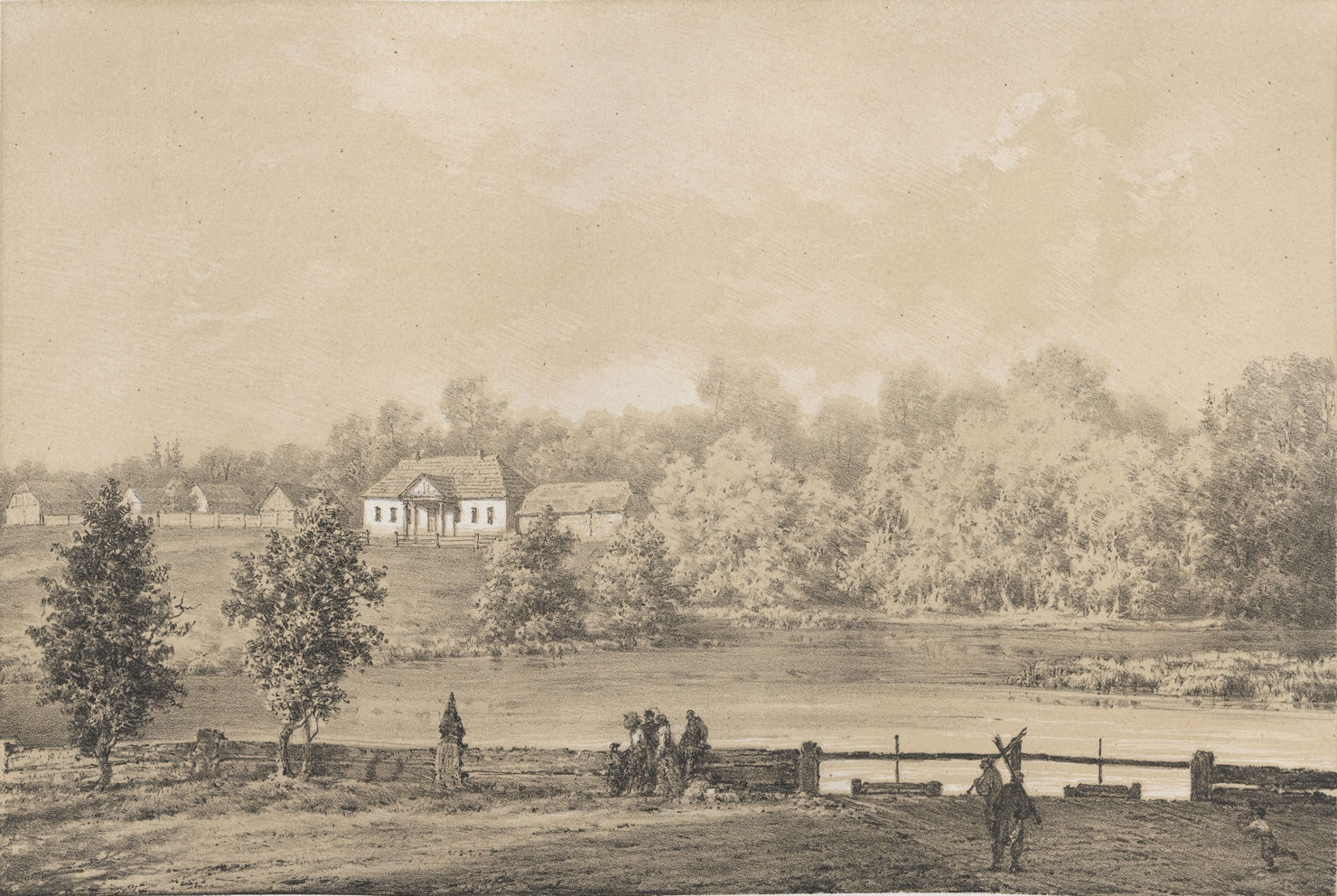 Беларуская (тарашкевіца): Шаўры (Šaŭry), сядзіба Нарбутаў (Narbut)